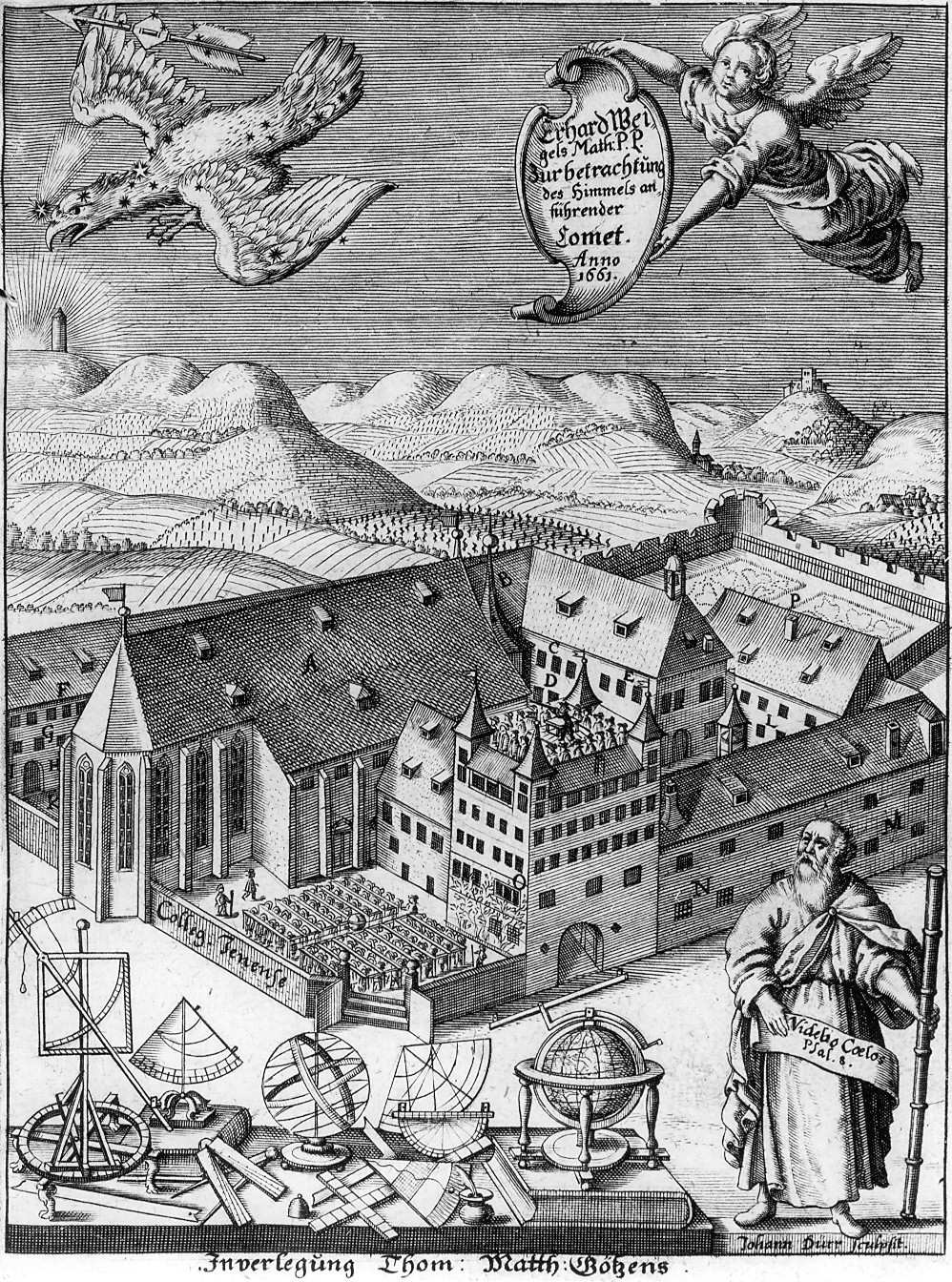 Das Collegium Jenense auf einem Kupferstich Johann Dürrs in Weigels Schrift „Himmelsspiegel“ (1661). Auf der Plattform des neugestalteten Torgebäudes zeigt Professor Weigel Studenten ein astronomisches Gerät . Im Vordergrund sind verschiedene astronomische Instrumente von Weigel abgebildet.